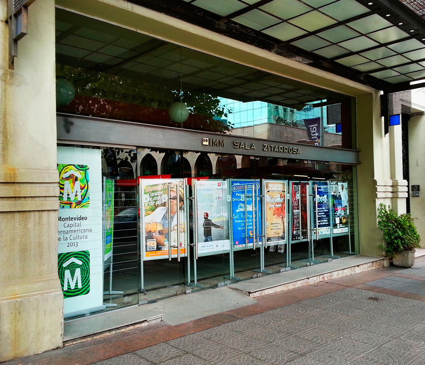 Sala Zitarrosa, sala en la ciudad de Montevideo, Uruguay, dedicada a los espectáculos musicales y audiovisuales.